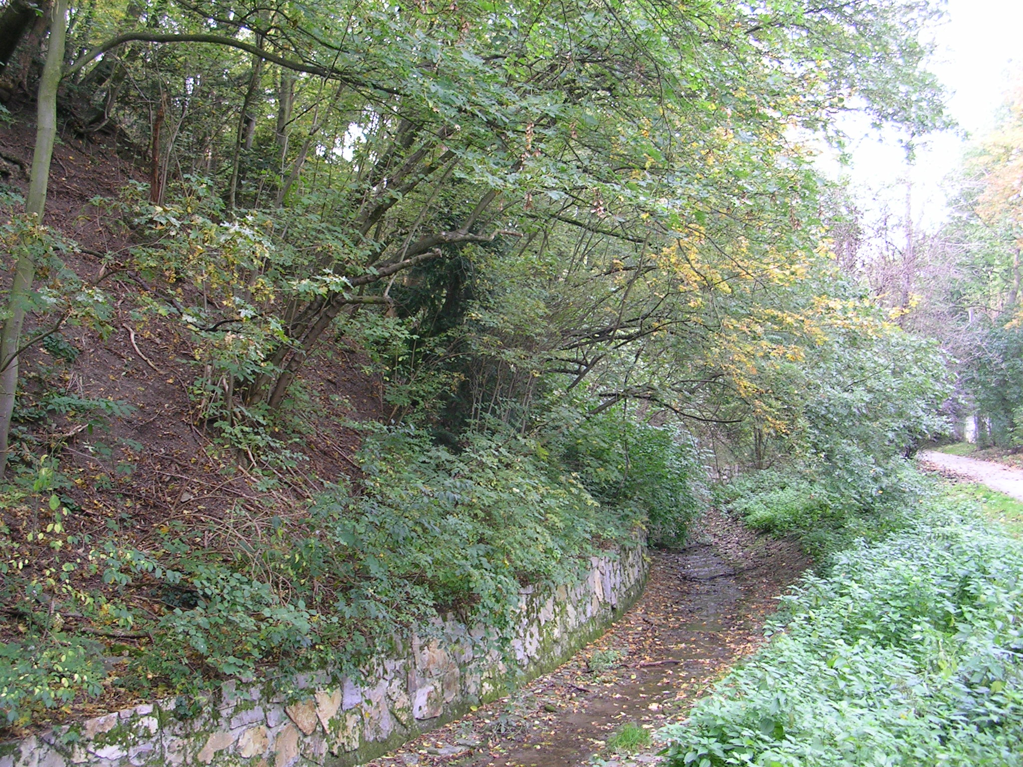 Arbesbach in Wien-Sievering Der Arbesbach kurz vor der Mündung in den Bachkanal